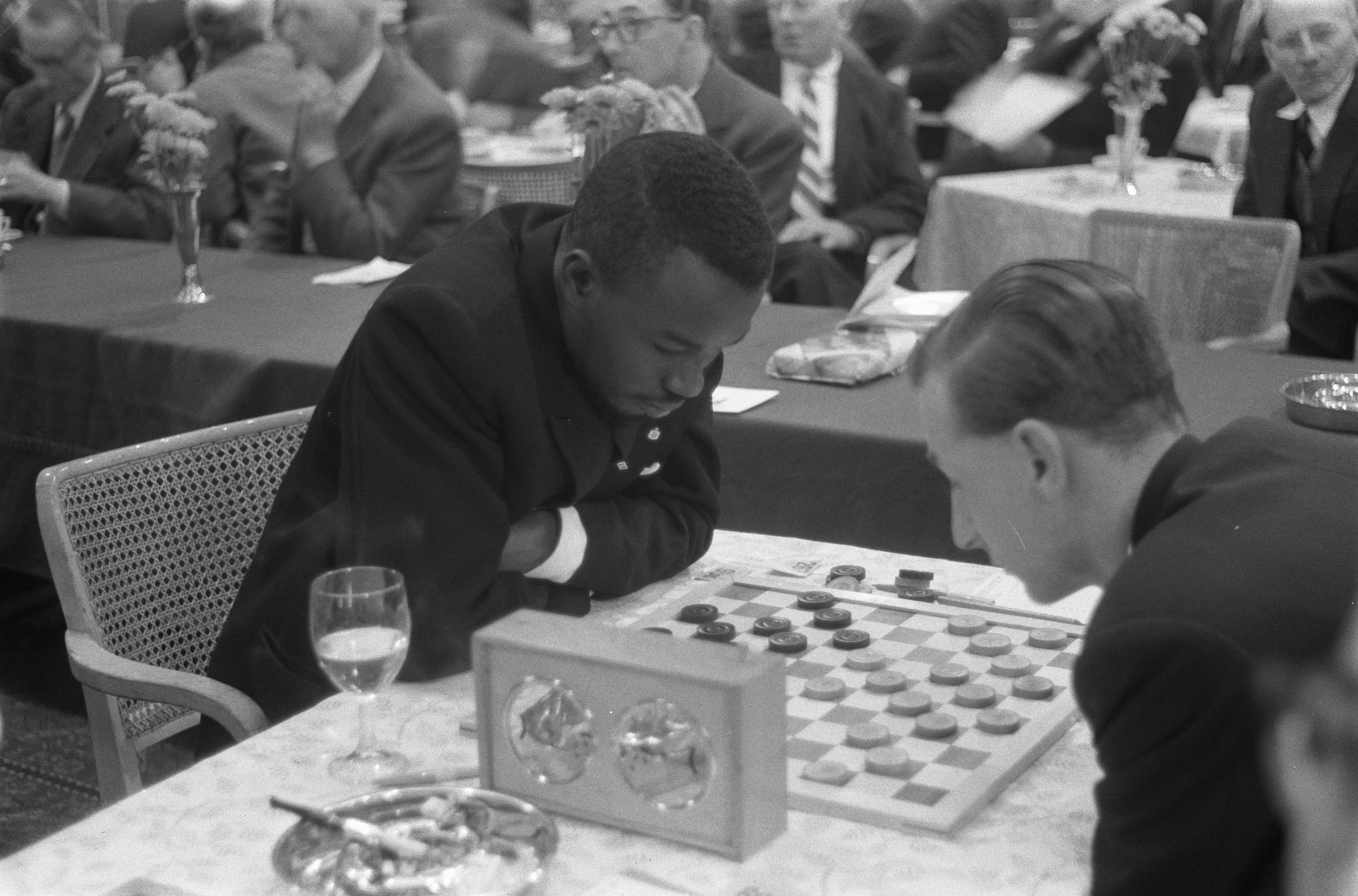 Wereldkampioenschap dammen te Amsterdam, Baby Sy